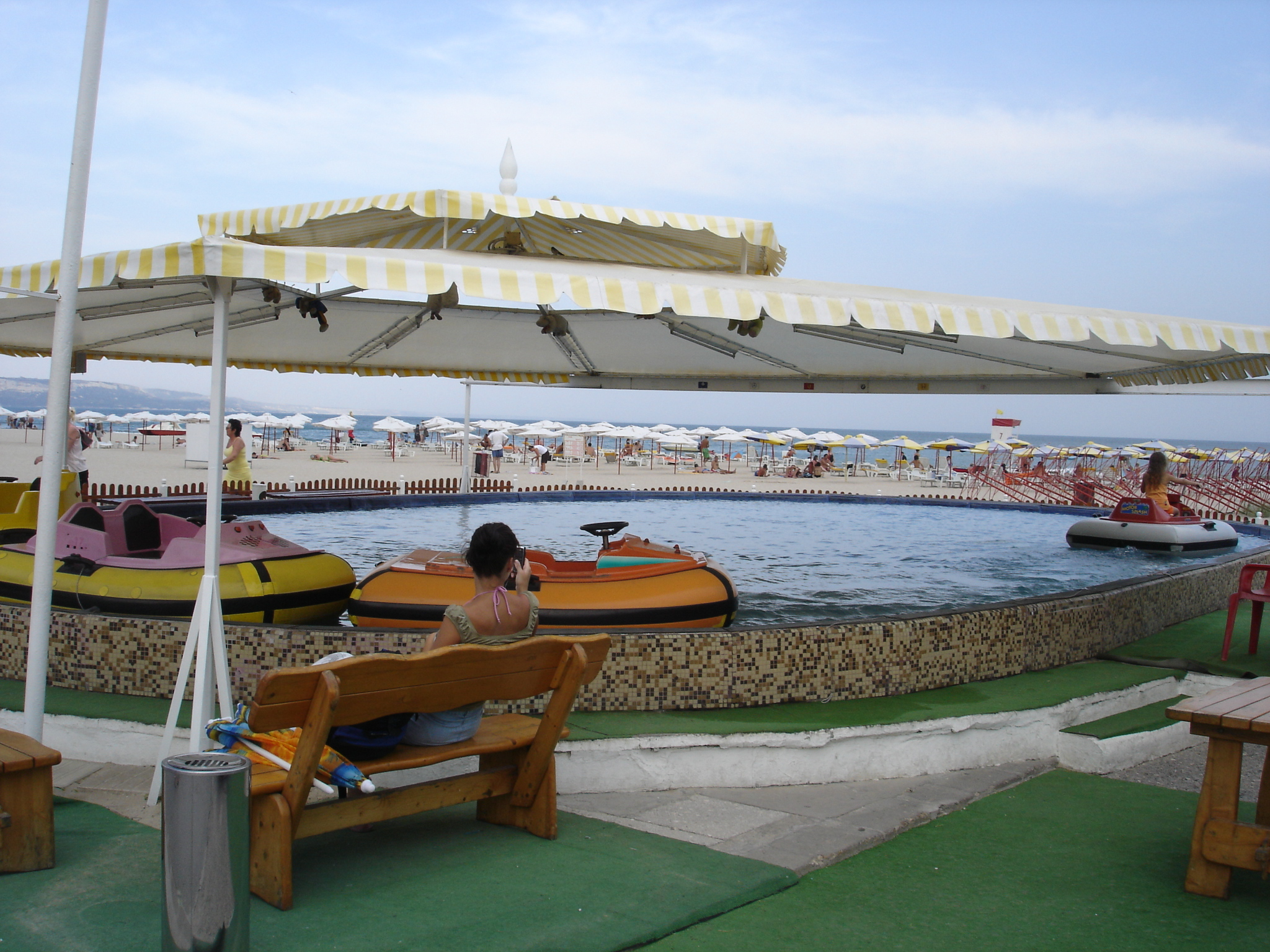 Beach in Albena, Bulgaria